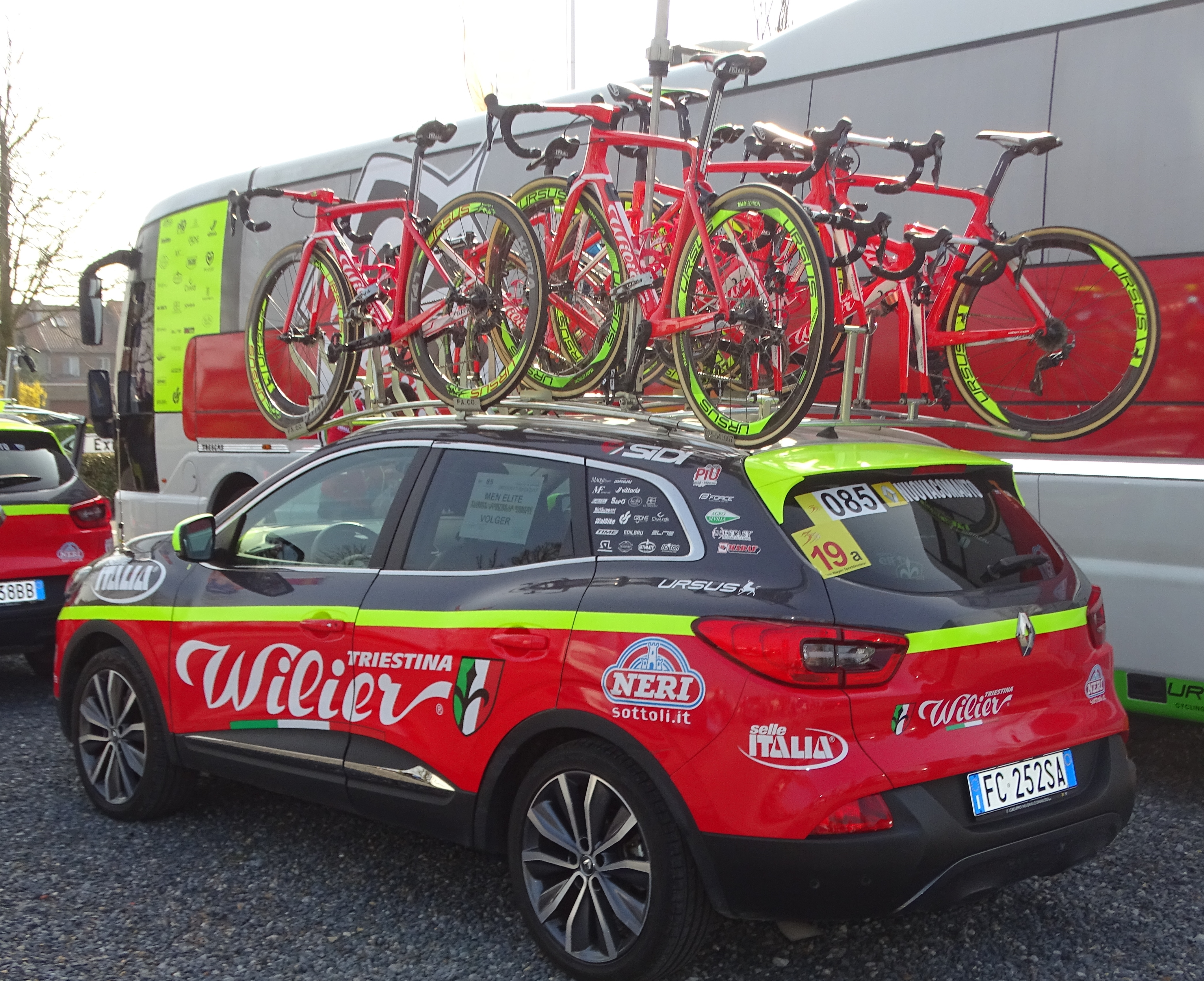 Reportage réalisé le mardi 28 mars à l'occasion de du départ de la première étape des Trois jours de La Panne 2017 à Adinkerque (La Panne), Belgique.